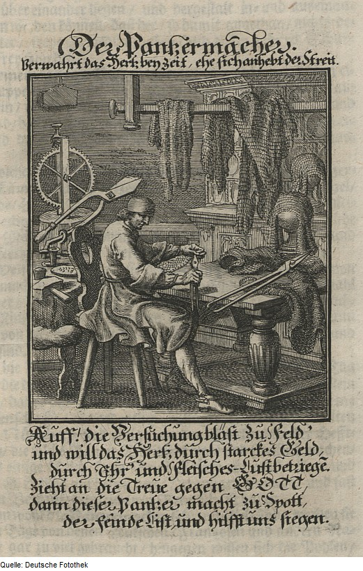 Original image description from the Deutsche Fotothek Ständebuch & Handwerk & Plattner & Rüstung & Harnisch & Kettenhemd Panzermacher, Sarwürker/Sarworter bei der Herstellung von Kettenrüstungen.